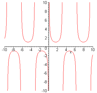 Plot der Funktion 1/sin(x).